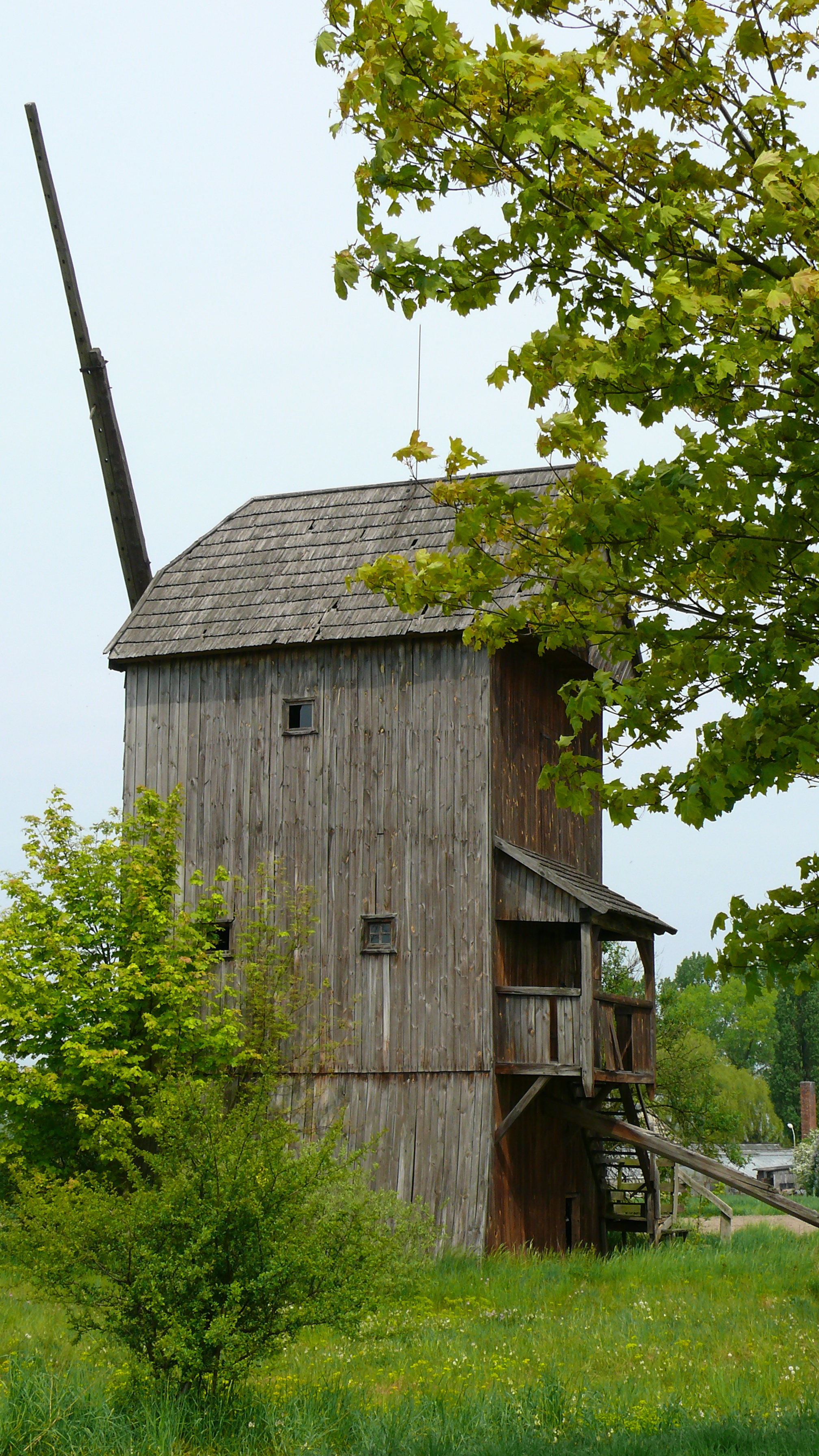 Wiatrak w Kawczynie